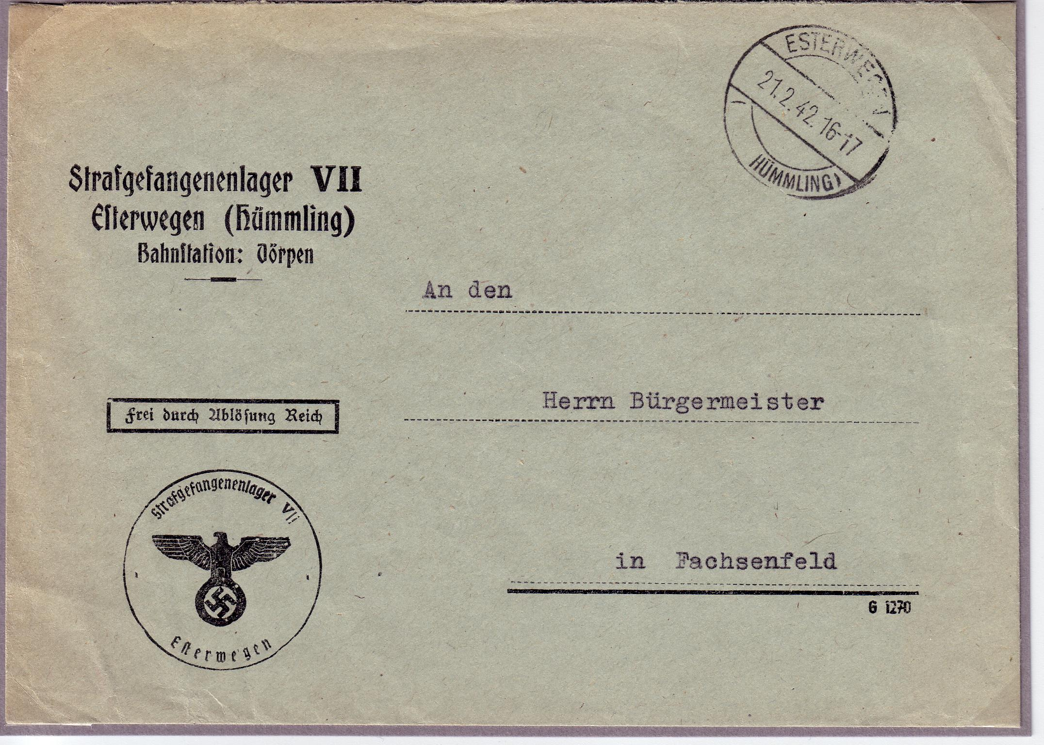 Dienstbrief Frei durch Ablösung Reich aus dem Strafgefangenenlager Esterwegen von 1942. Dienstsiegel: "Strafgefangenenlager VII Esterwegen". Poststempel: "Esterwegen (Hümmling), 21.2.1942.